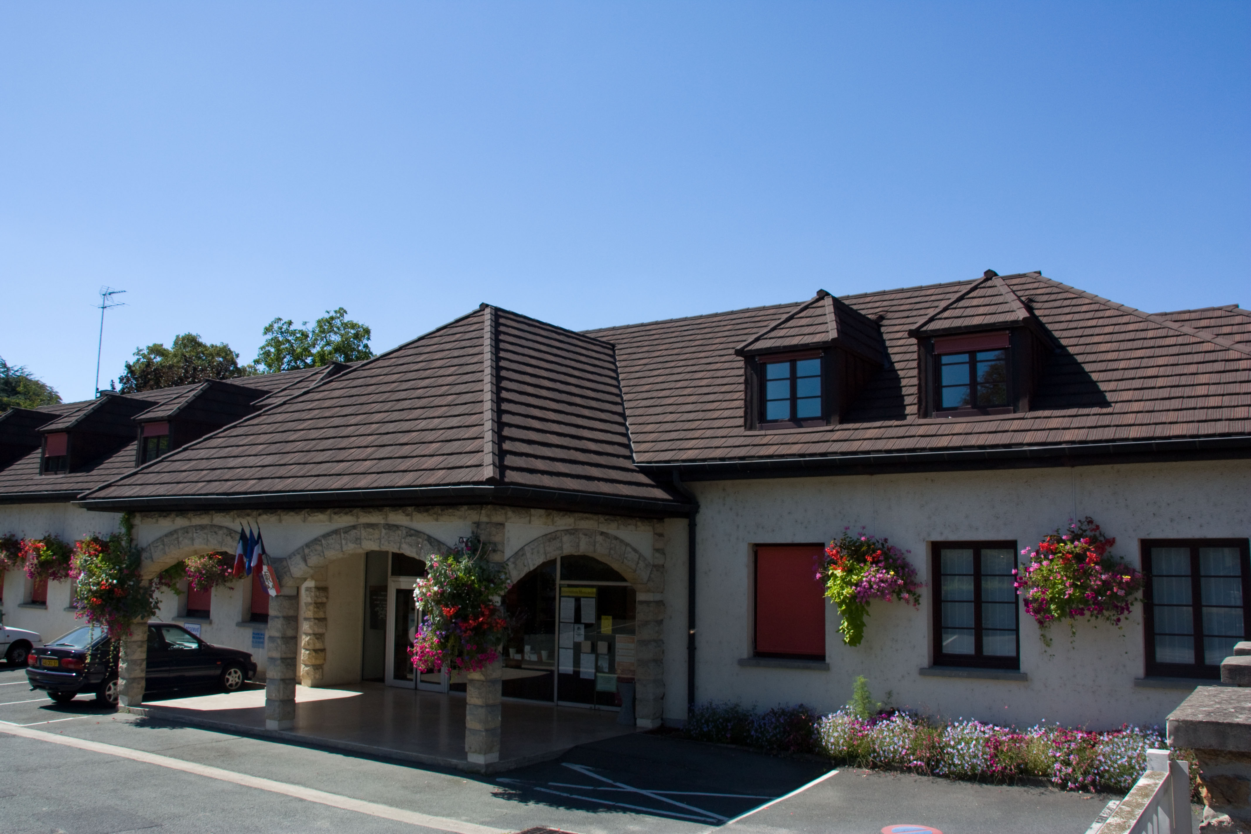 Mairie de Saint-Germain-lès-Corbeil, Saint-Germain-lès-Corbeil, Essonne, France